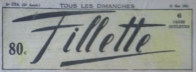 Fillette (titre, N°1714, 1941-05-25)